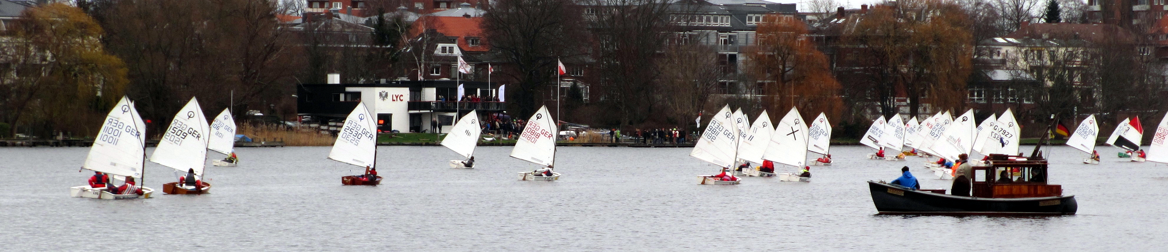 Eisarsch-Regatta auf der Wakenitz in Lübeck 2013; im Hintergrund das Vereinsgebäude des Lübecker Yacht Clubs